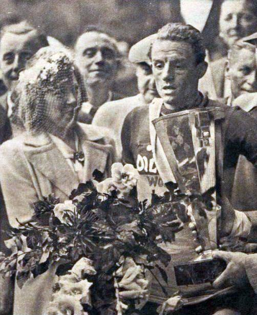 Amédée Fournier (août 1941) - Couverture du Miroir des sports